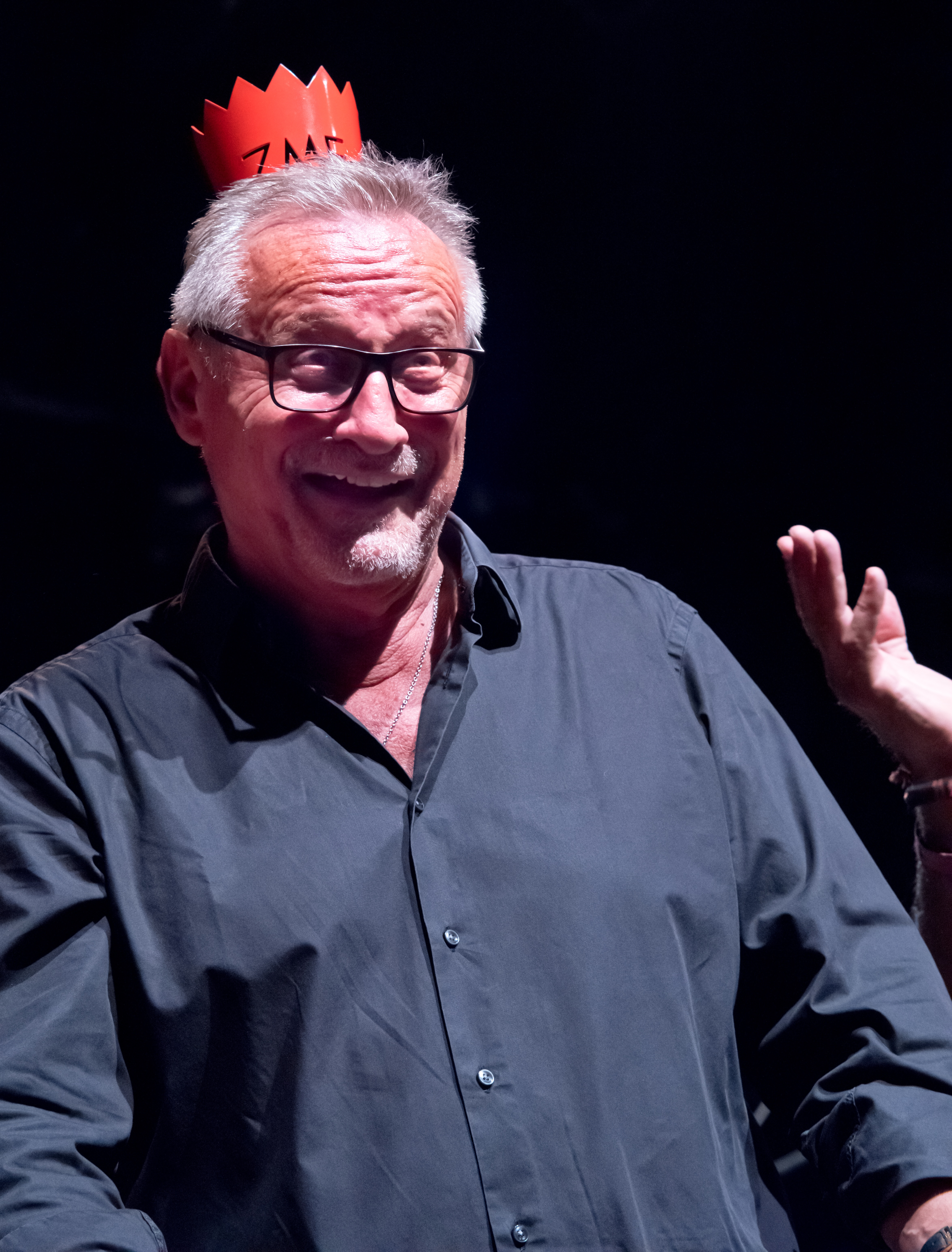 Bilder vom Zelt Musik Festival 2018 in Freiburg im Breisgau Die Gala des ZMF am 22.07.2018 Der Ehrenpreisträger 2018 des ZMF